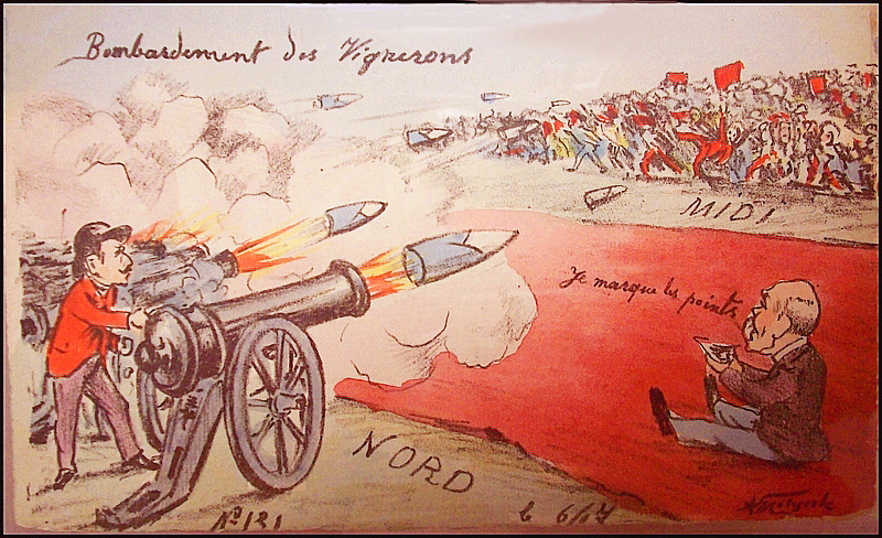 Le bombardement des vignerons